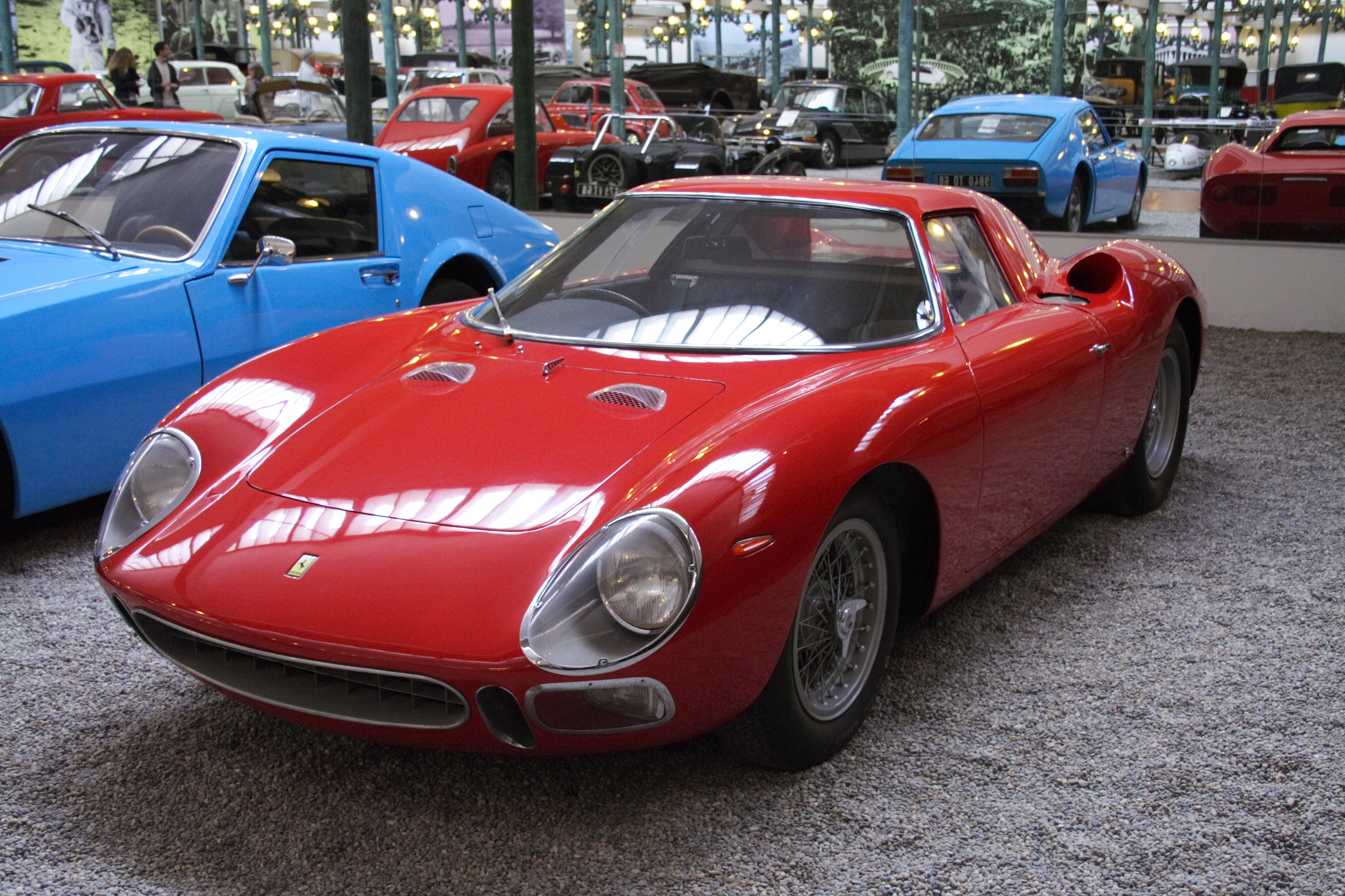 Ferrari 250LM 1964 at the Musée National de l'Automobil(Mulhouse, France)